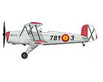 Bückers Bü-131 (CASA 1.131 E/L/H) Jungmann